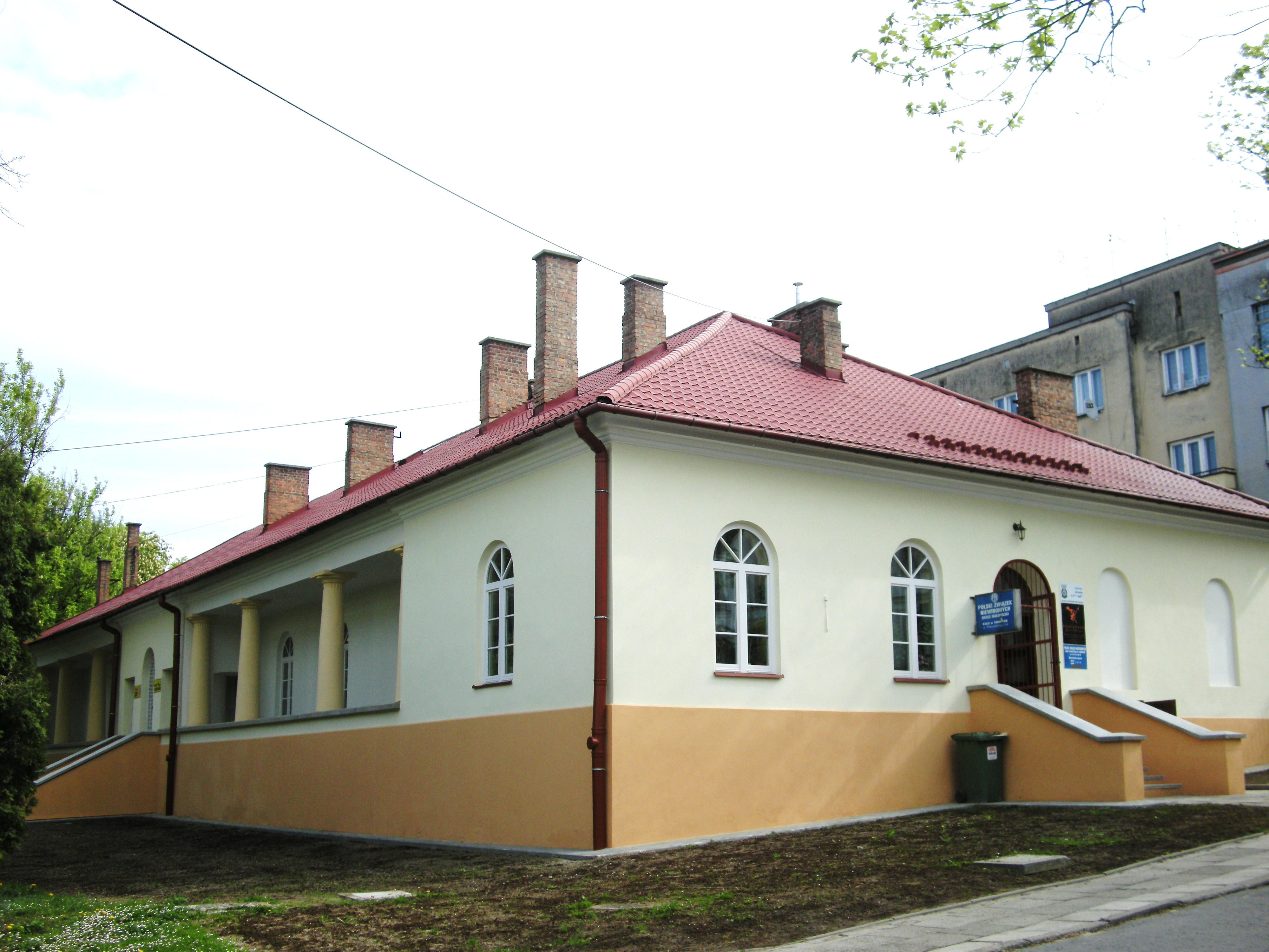 Klasycystyczny budynek dawnego szpitala wojskowego z początku XIX w.